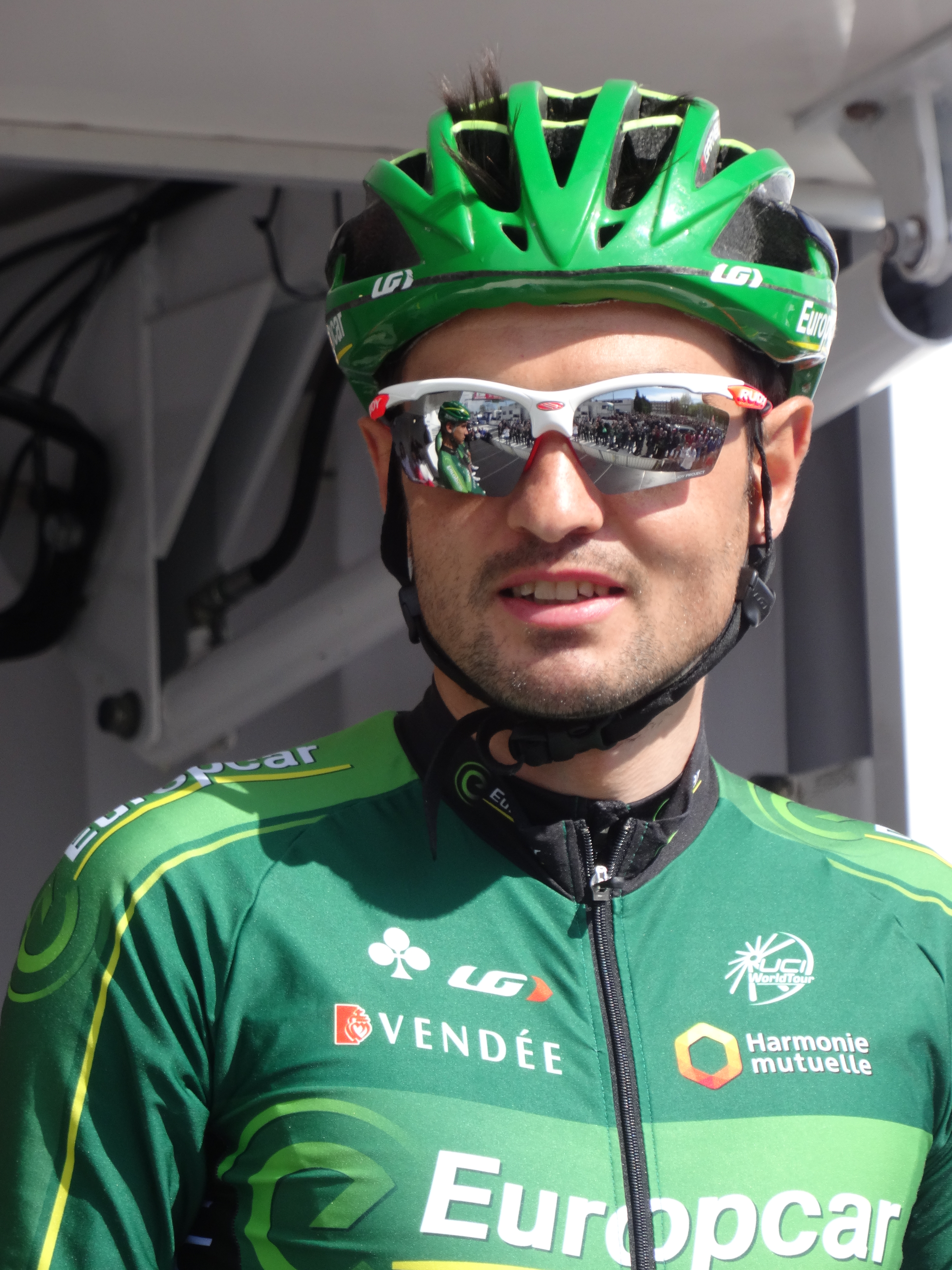 Reportage réalisé le jeudi 17 avril à l'occasion du départ et de l'arrivée du Grand Prix de Denain 2014 à Denain, Nord, Nord-Pas-de-Calais, France.